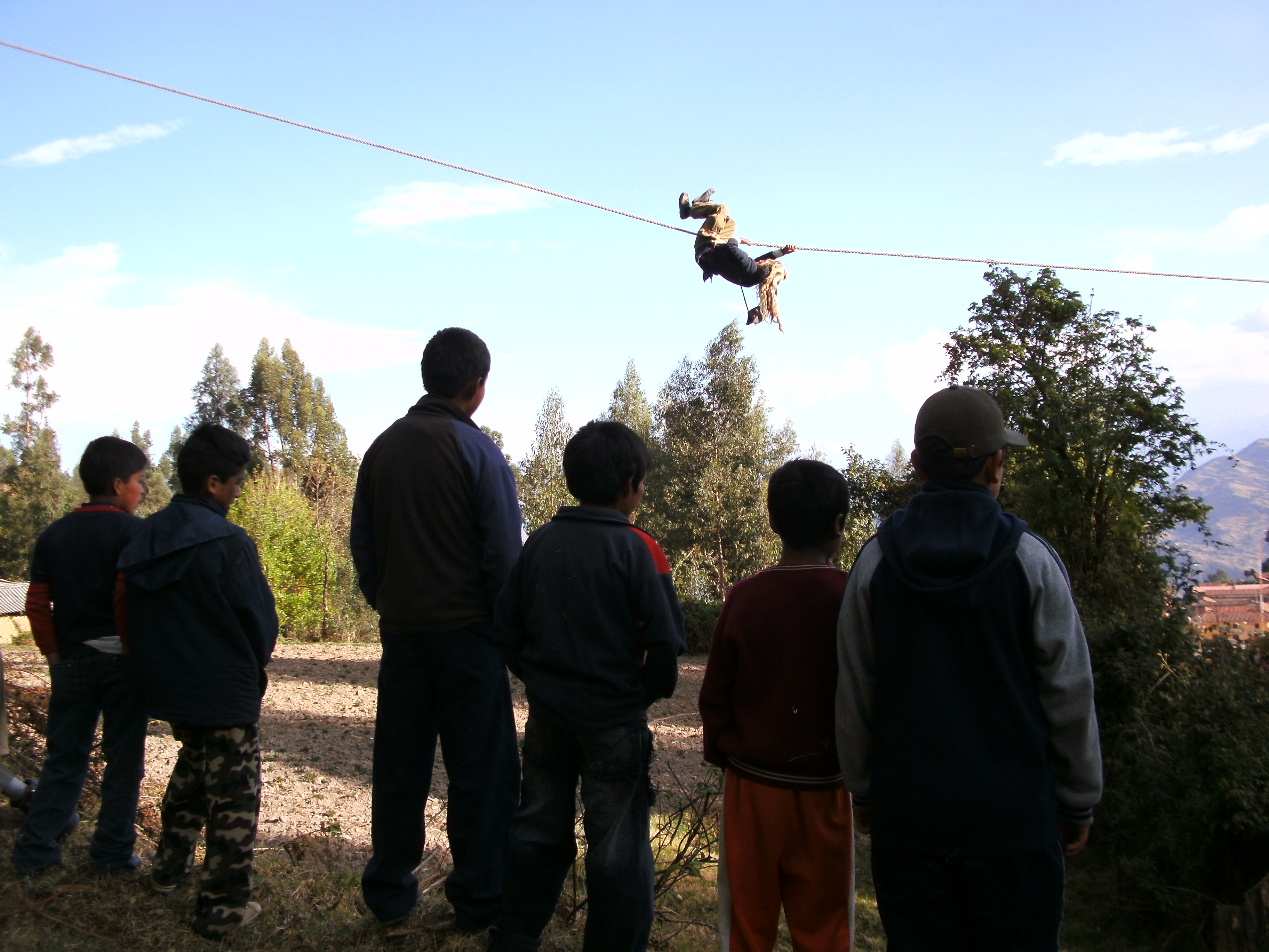 Simboliza el paso de los guerreros de la Selva hacia los Andes, exactamente a Piscobamba